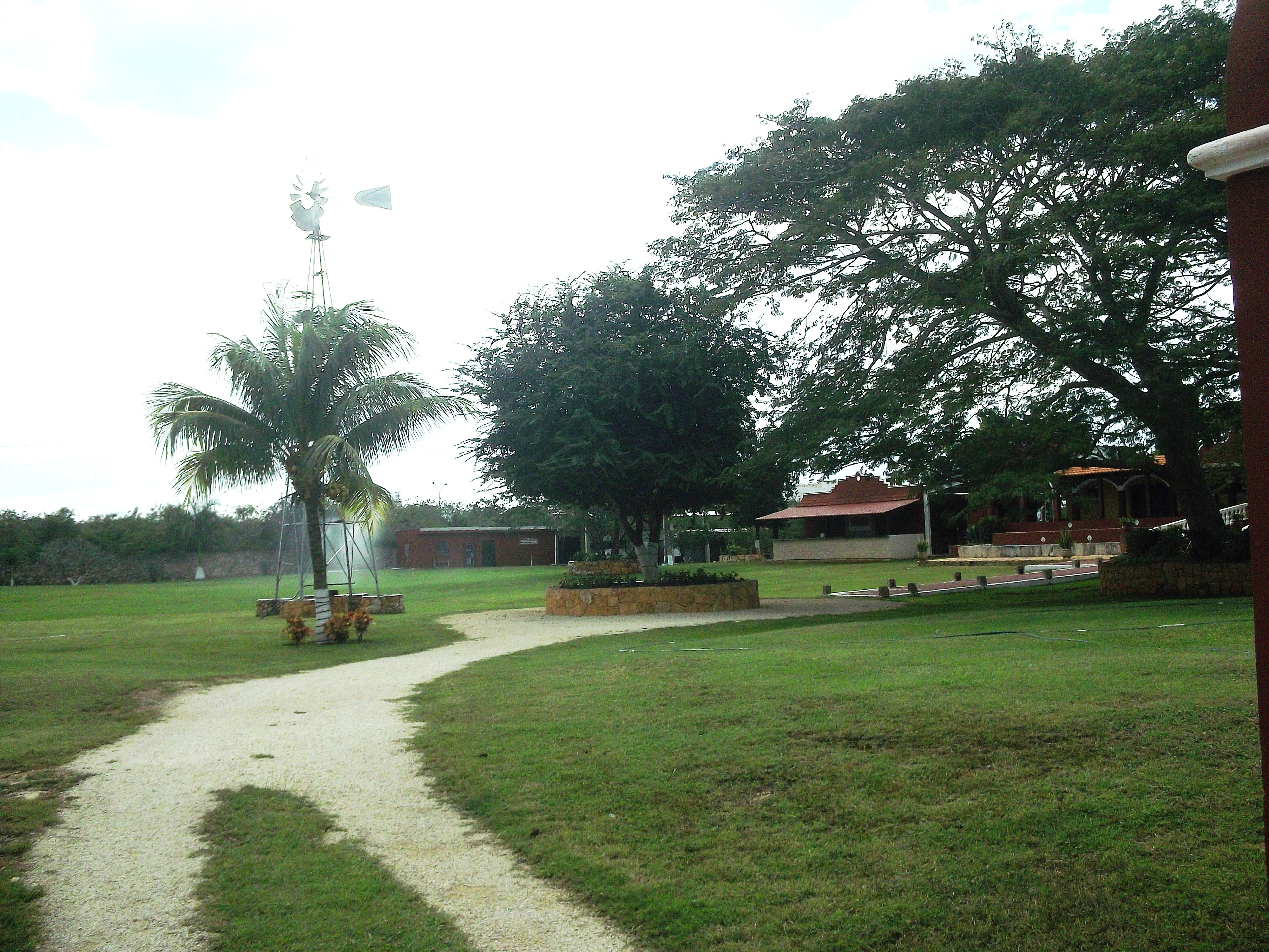 Hacienda San Pedro Palomeque.